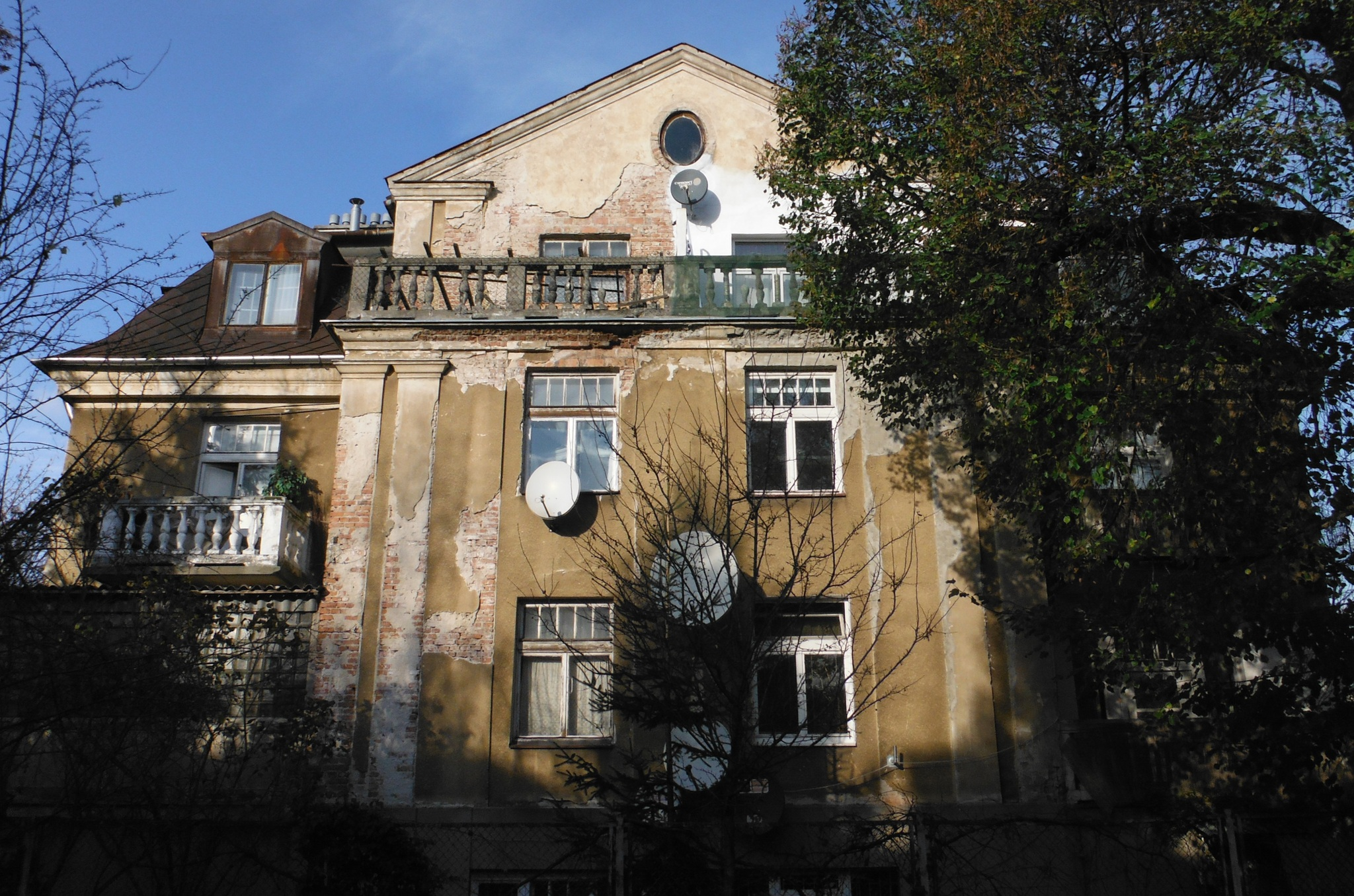 Dom przy ul. Estońskiej 1 z ok. 1930 roku. Wpisany do rejestru zabytków. Widok od strony ulicy Berezyńskiej.